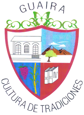 Escudo del departamento del Guairá, Paraguay